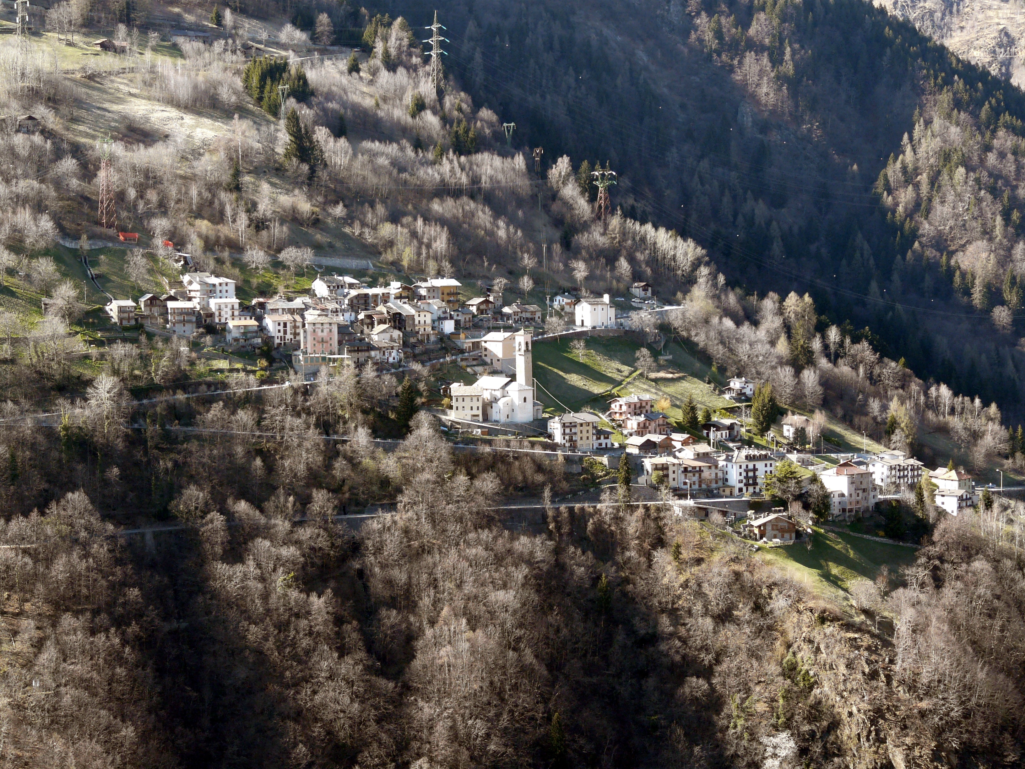 Pedesina (33 ab.) in provincia di Sondro, il comune più piccolo d'Italia.